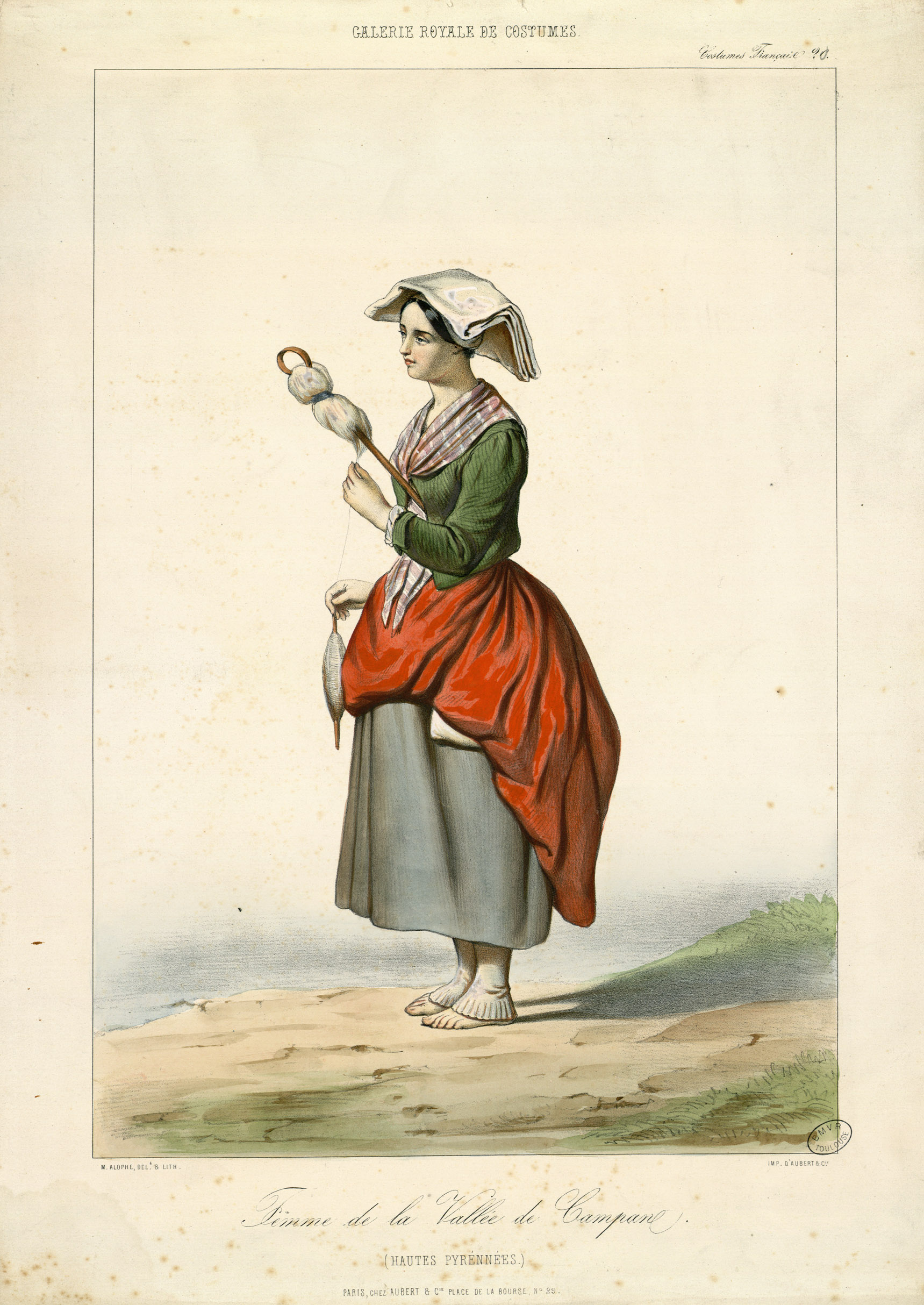 Costumes pyrénéens extraits de la série intitulée : Galerie royale de costumes (costumes français, n° 20) Planches séparées, en couleurs (aquarellées et gommées), dessinées et lithographiées par M. Alophe, imprimées par d'Aubert et Cie Ancely, René (1876 - 1966). Possesseur